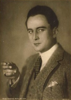 Porträt des Schauspielers Alphons Fryland von Nicola Perscheid